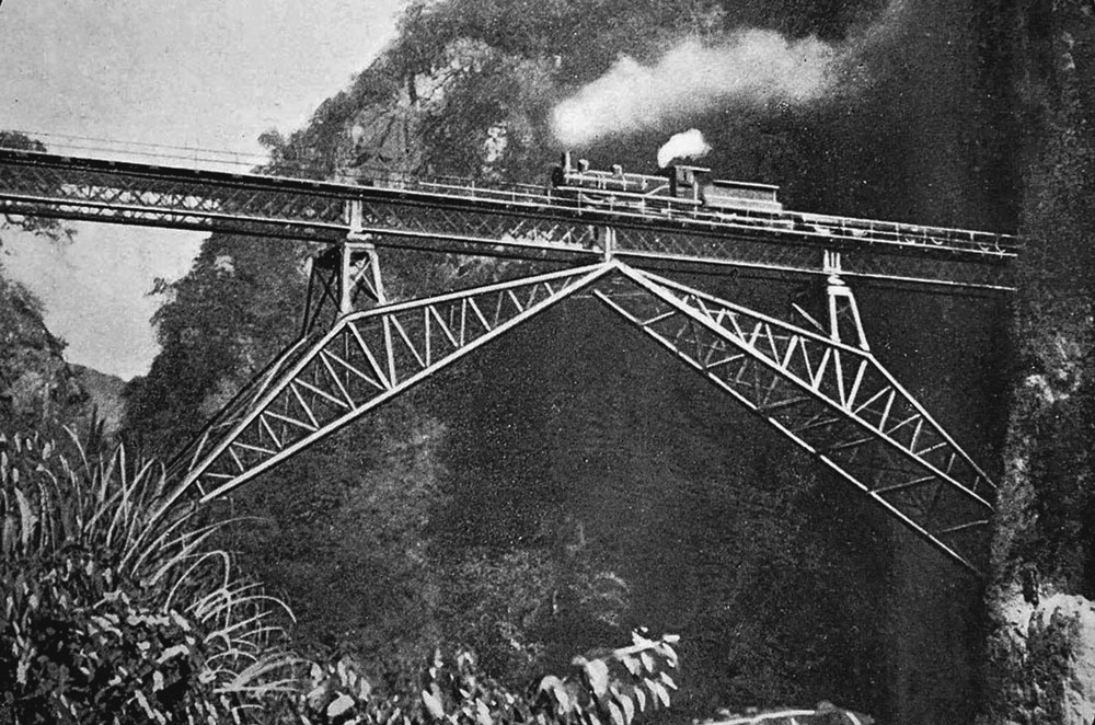 火车通过滇越铁路人字桥